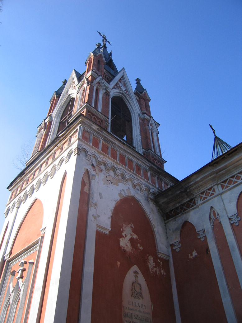 Rasos cemetery in Vilnius (Lithuania)